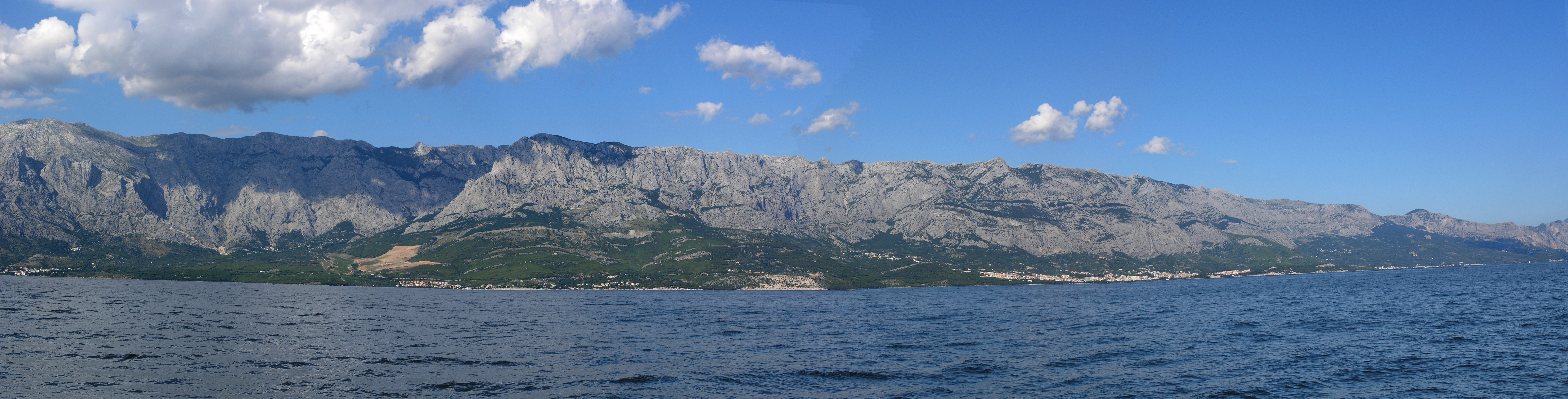 Хорватия - Макарская ривьера - горный массив Биоково (в районе Башка Вода)